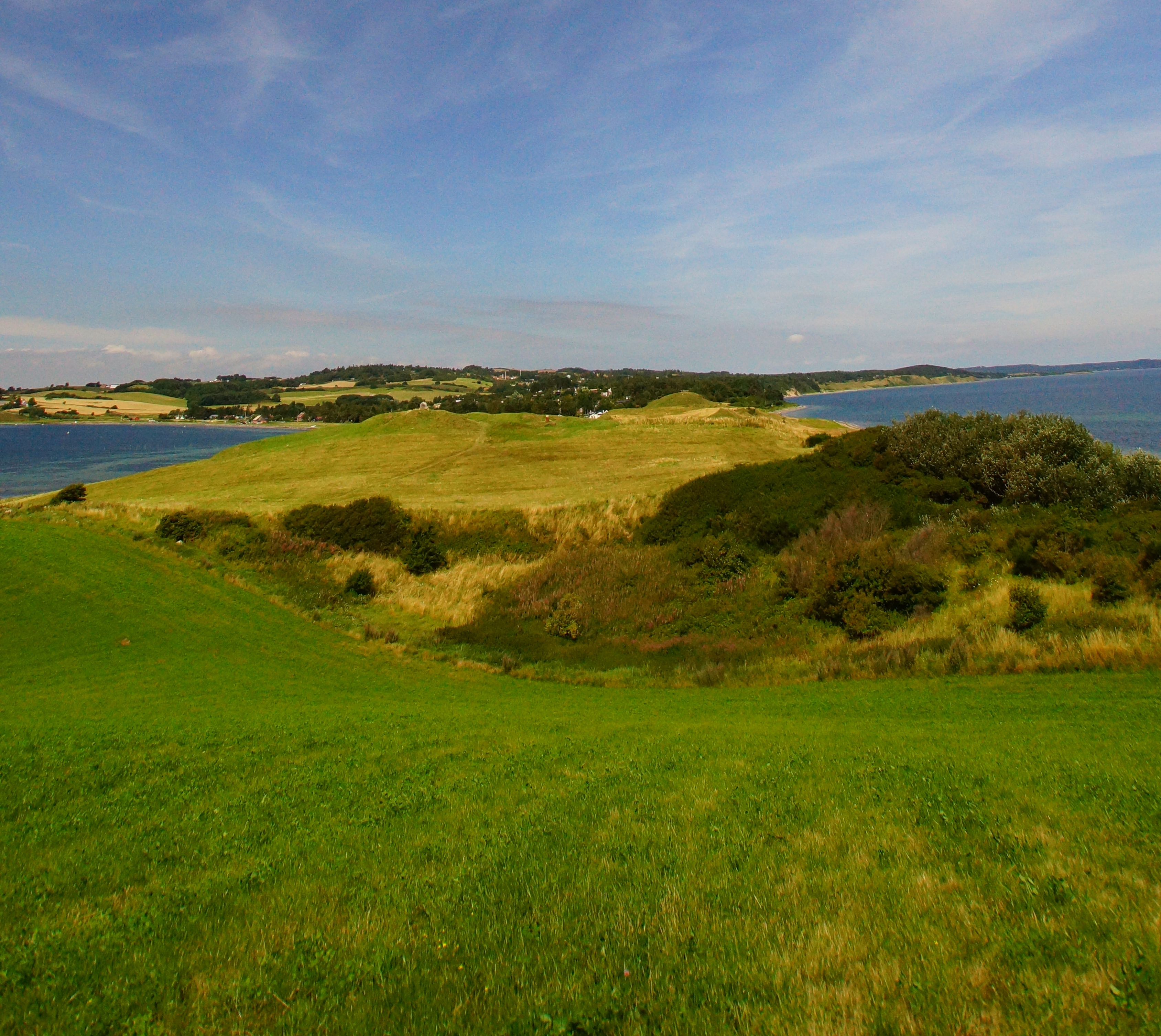 Draget set fra syd mod nord